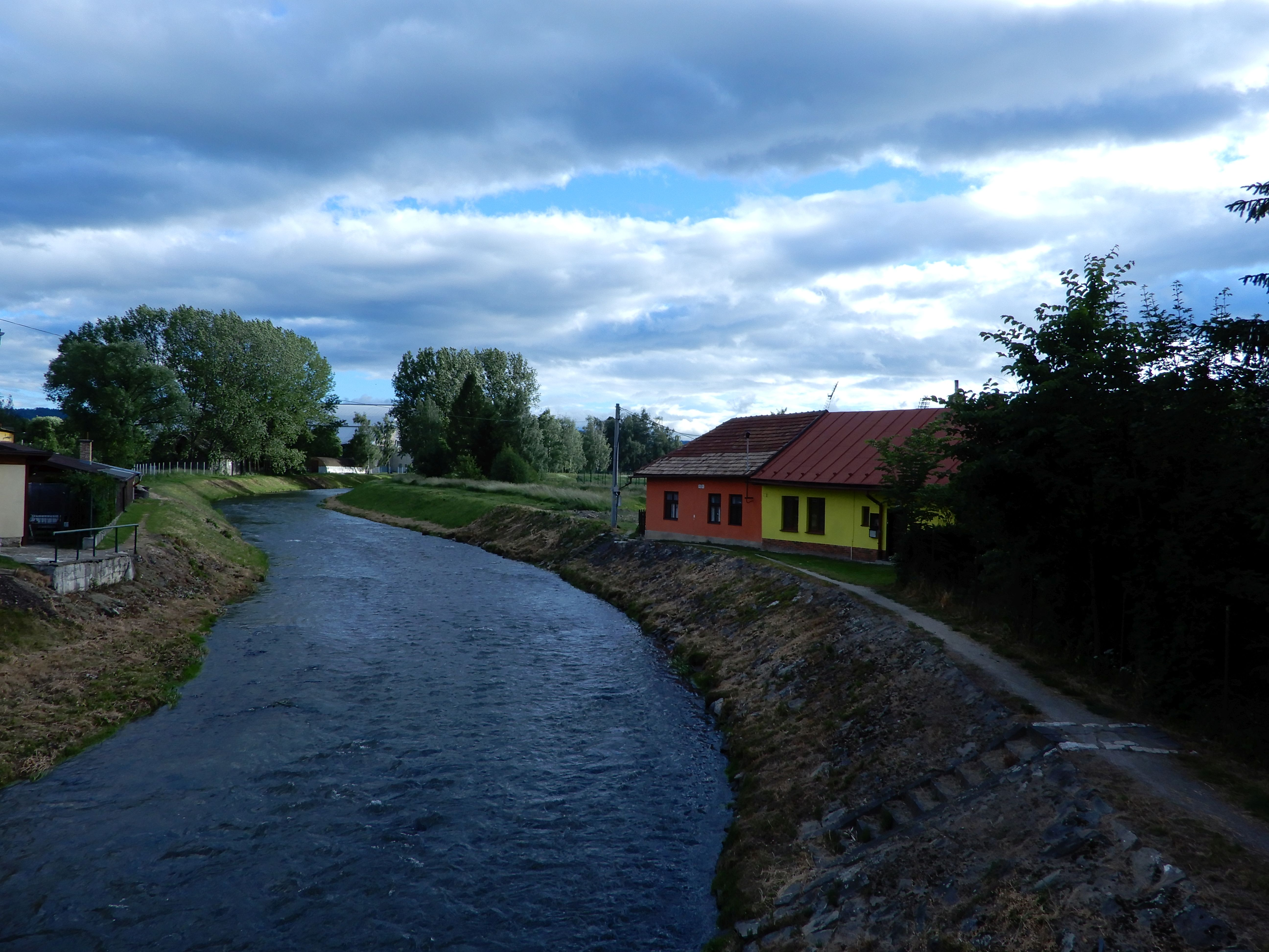 Spišská Sobota, kostel sv. Jiří, gotická kalvárie, 1464